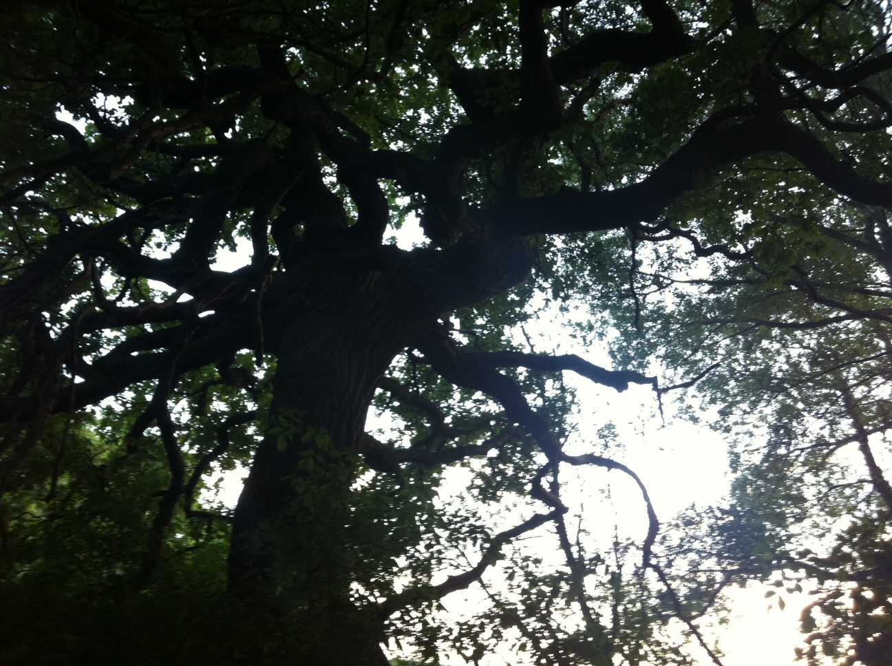 Astwerk Rehrenborn-Eiche